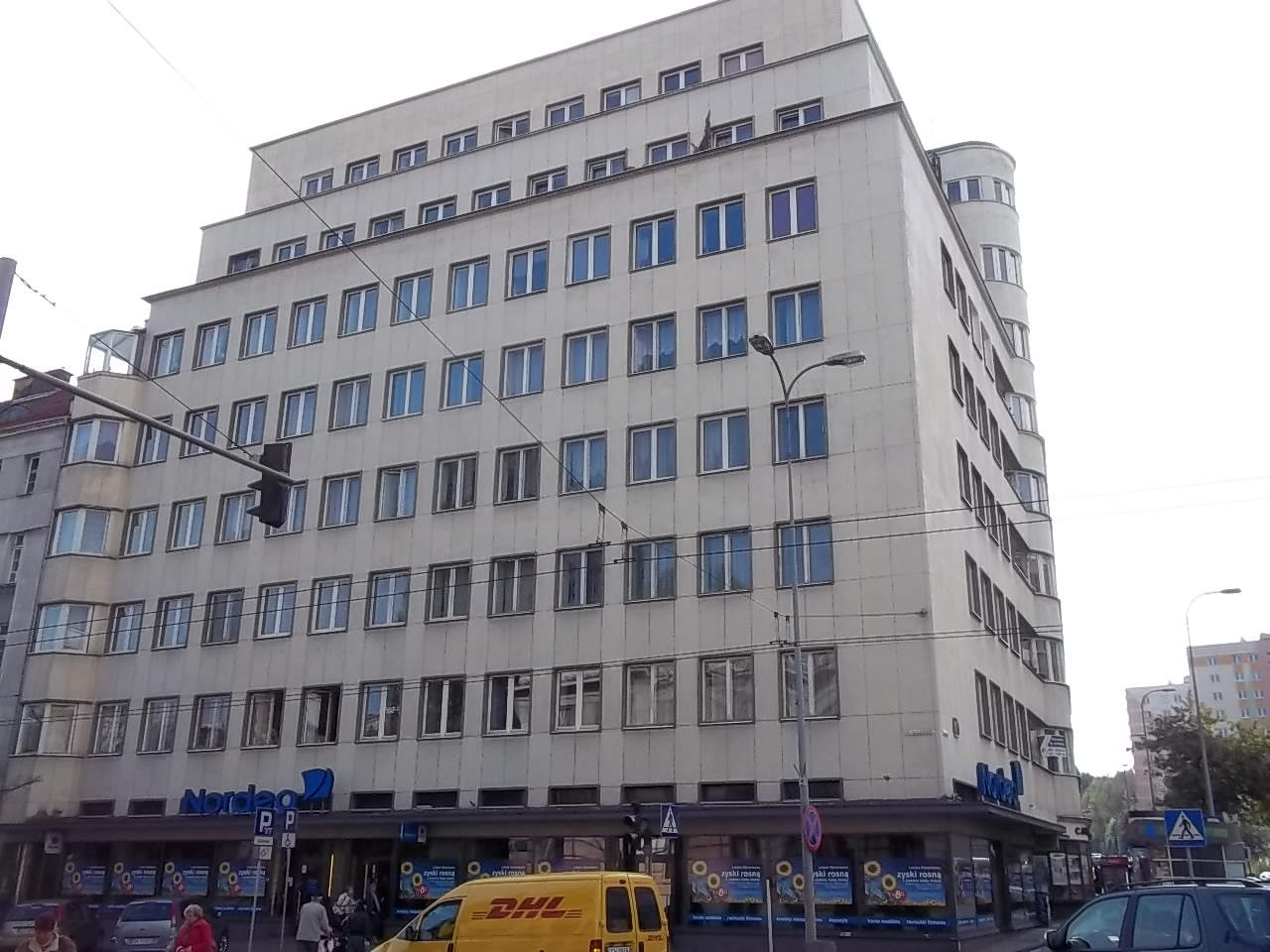 Gdynia Śródmieście, ul. 3 Maja 27-31 / Batorego 26 - budynek mieszkalny FE BGK, 1936-1938